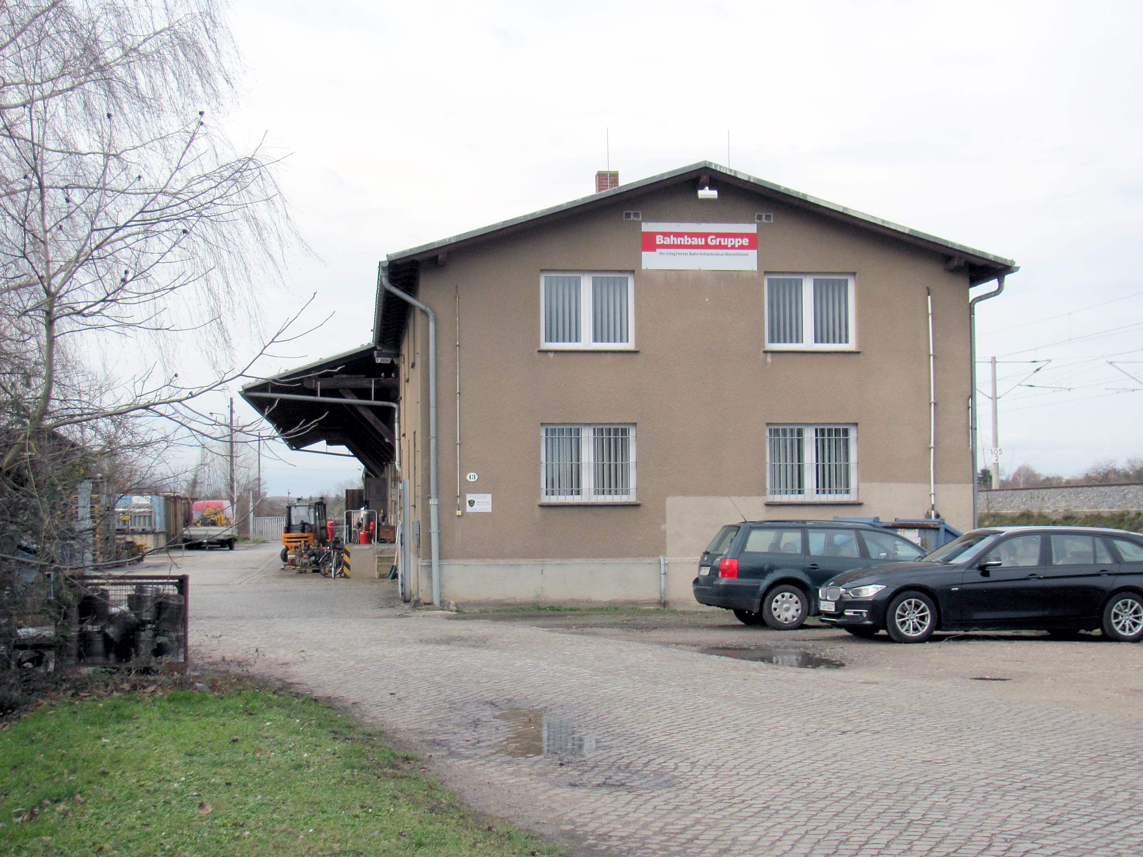 Radebeul-Kötzschenbroda, ehemaliger Güterhof des Bahnhof Kötzschenbroda